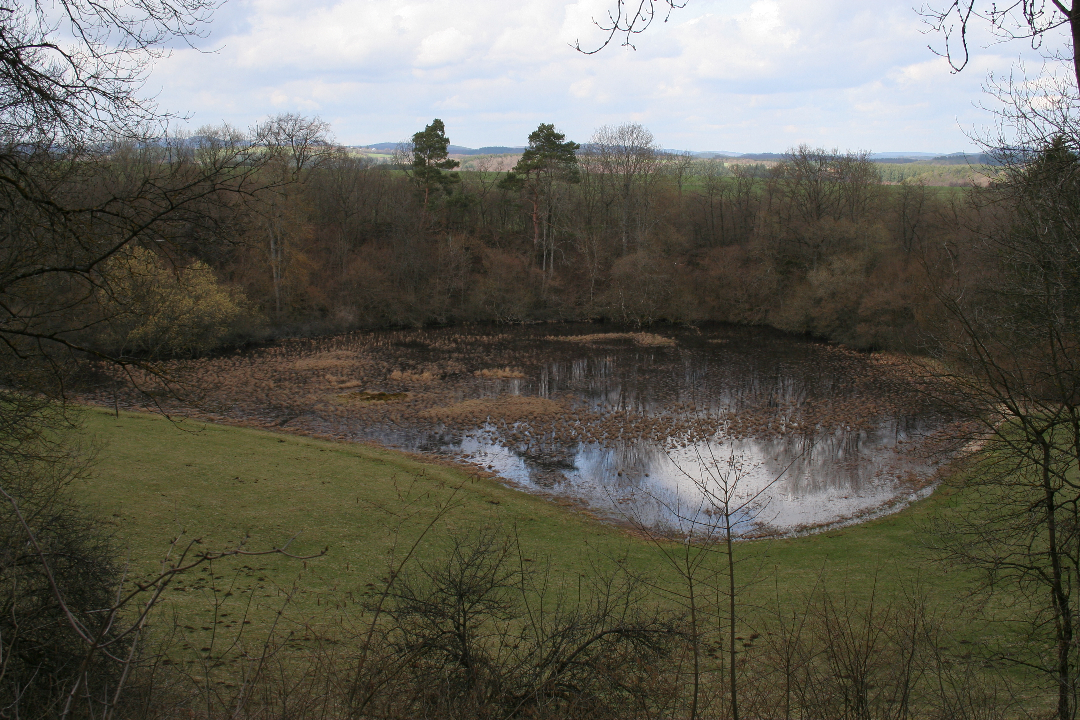 Das Hinkelsmaar nahe dem Windsborner Bergkratersee in der Vulkaneifel